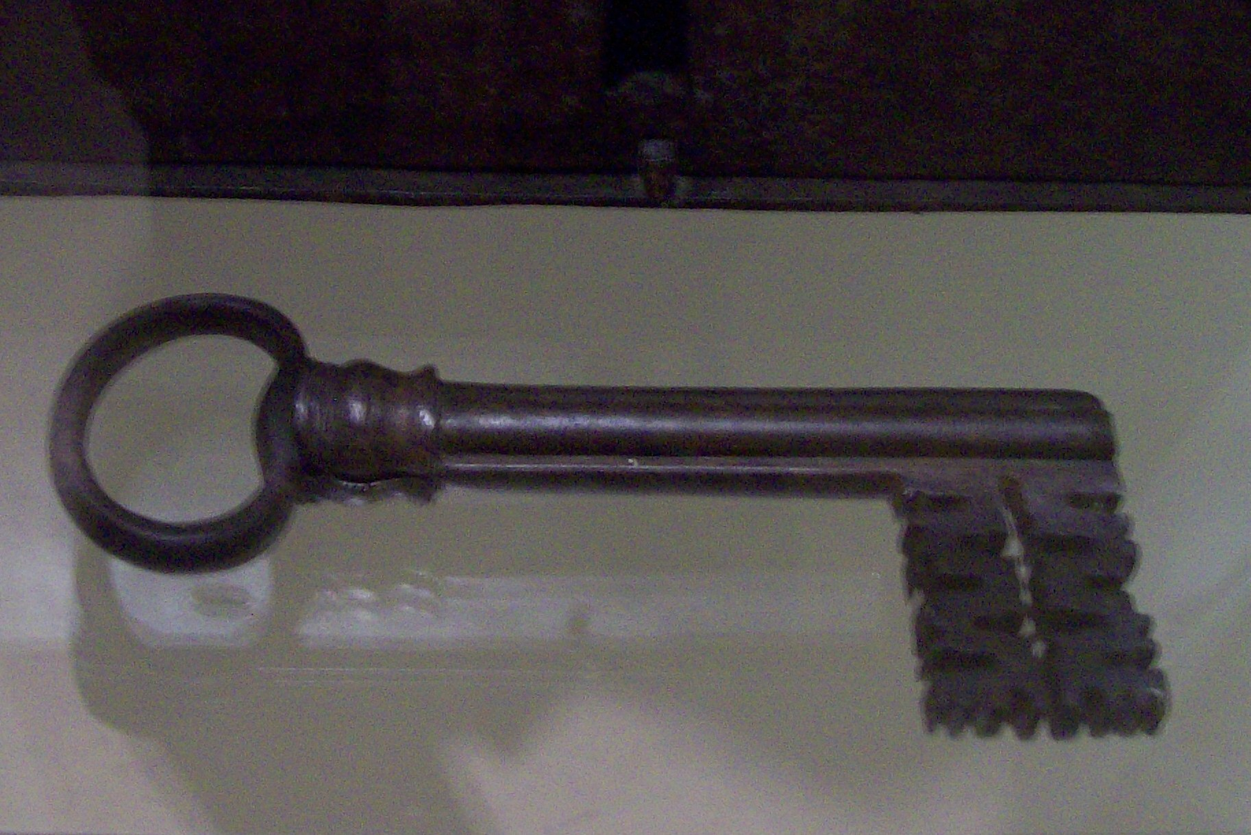 Llave de apertura del portón del Fuerte de Buenos Aires. En exhibición en el Museo del Bicentenario.